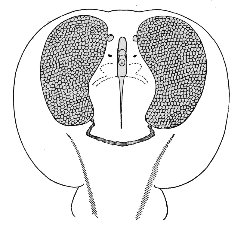 Torpedo electric organs